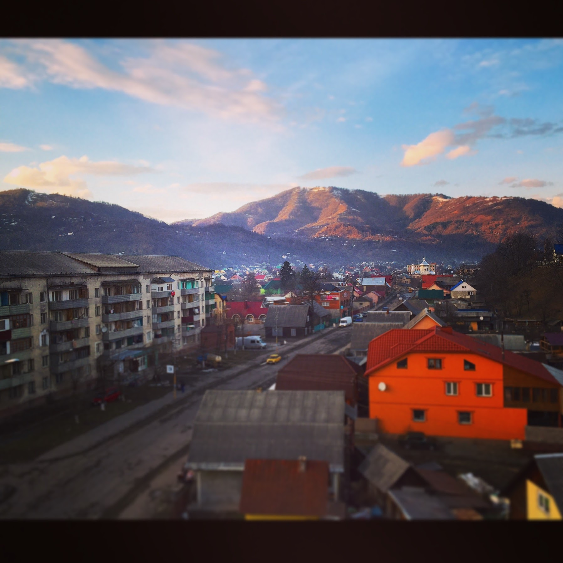 Вид на Дубове. Західна сторона